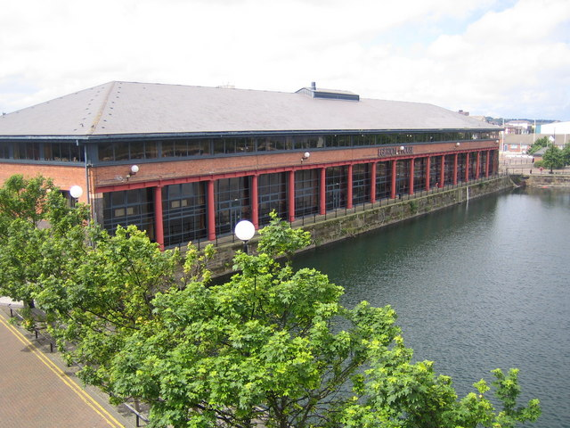 Birkenhead docks: Egerton House